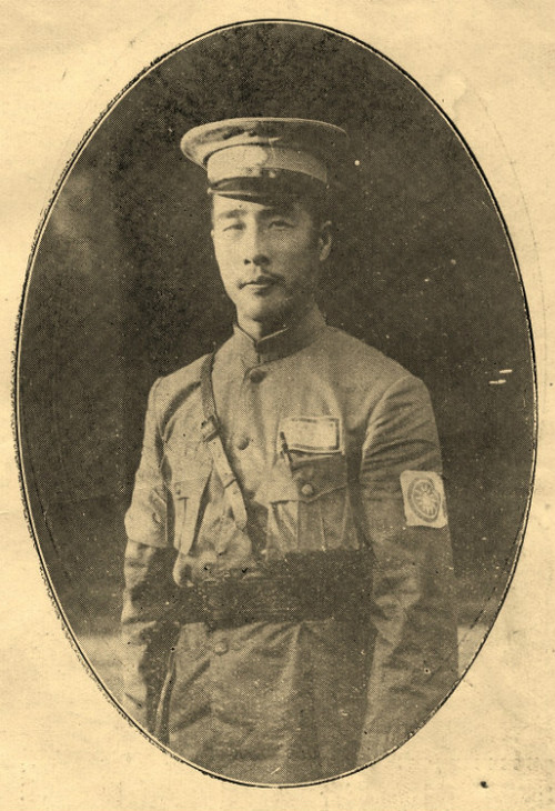 第一軍団指揮官時代 （1930年）